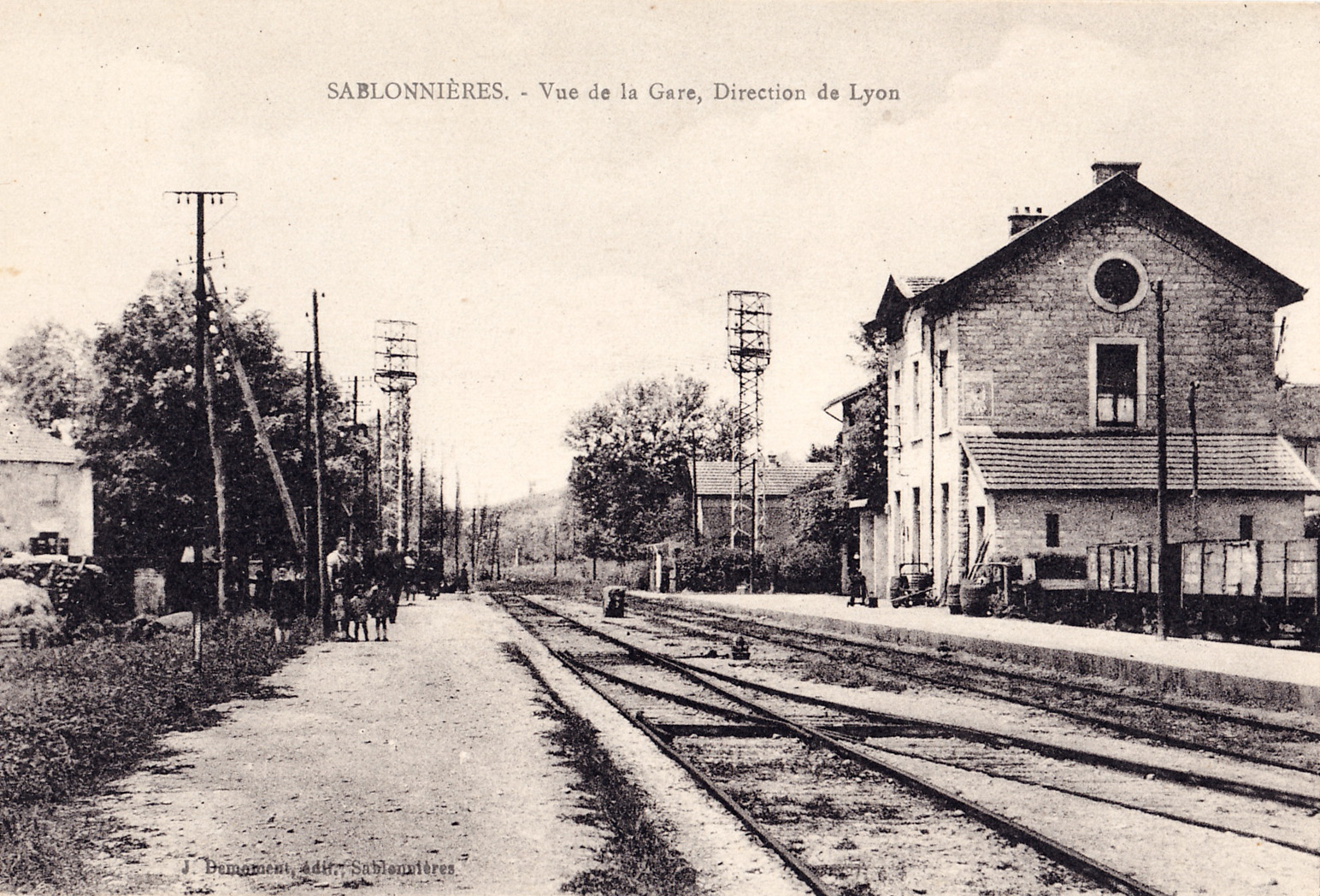 Carte postale ancienne éditée par J. Demoment à Sablonières : SABLONIERES - Vue de la Gare, direction de Lyon